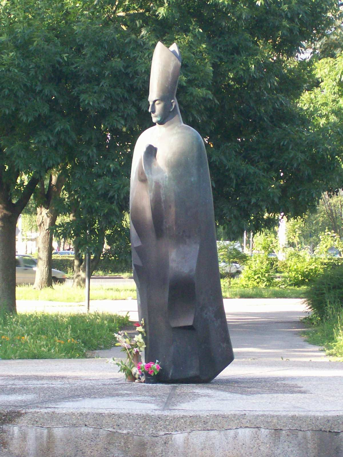 Spomenik Alojziju Stepincu u Novom Zagrebu, rad Tomislava Ostoje